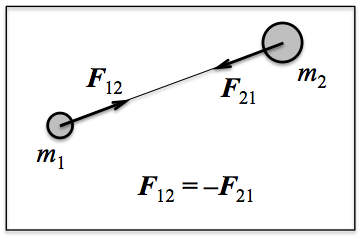 Bi gorputzek elkarri egiten dizkioten erakartze-indar grabitatorioen norabide eta noranzkoak.